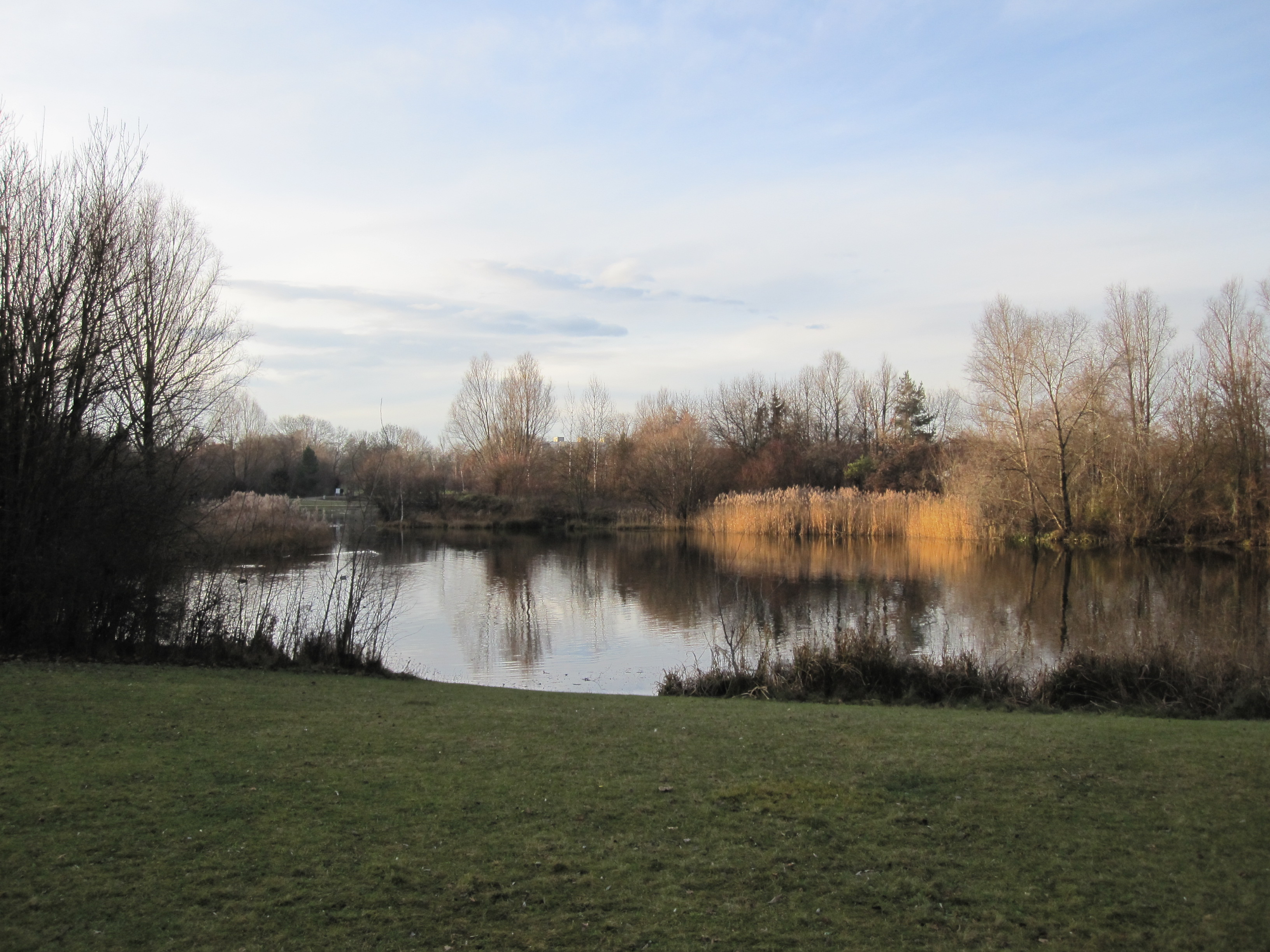 See im Ostteil des Denninger Angers